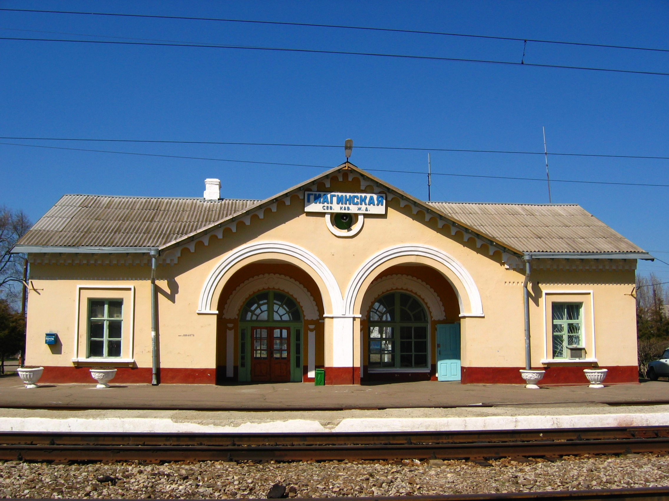 Вокзал ст. Гиагинская в 2006 г.